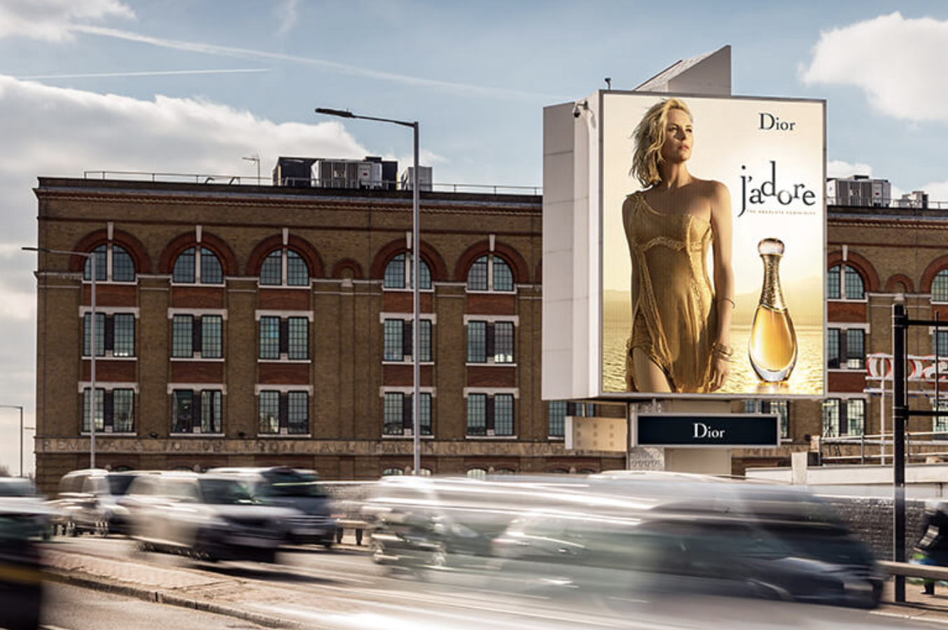 Affichage digital